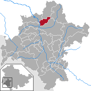 Fambach in Thuringia - District Schmalkalden-Meiningen